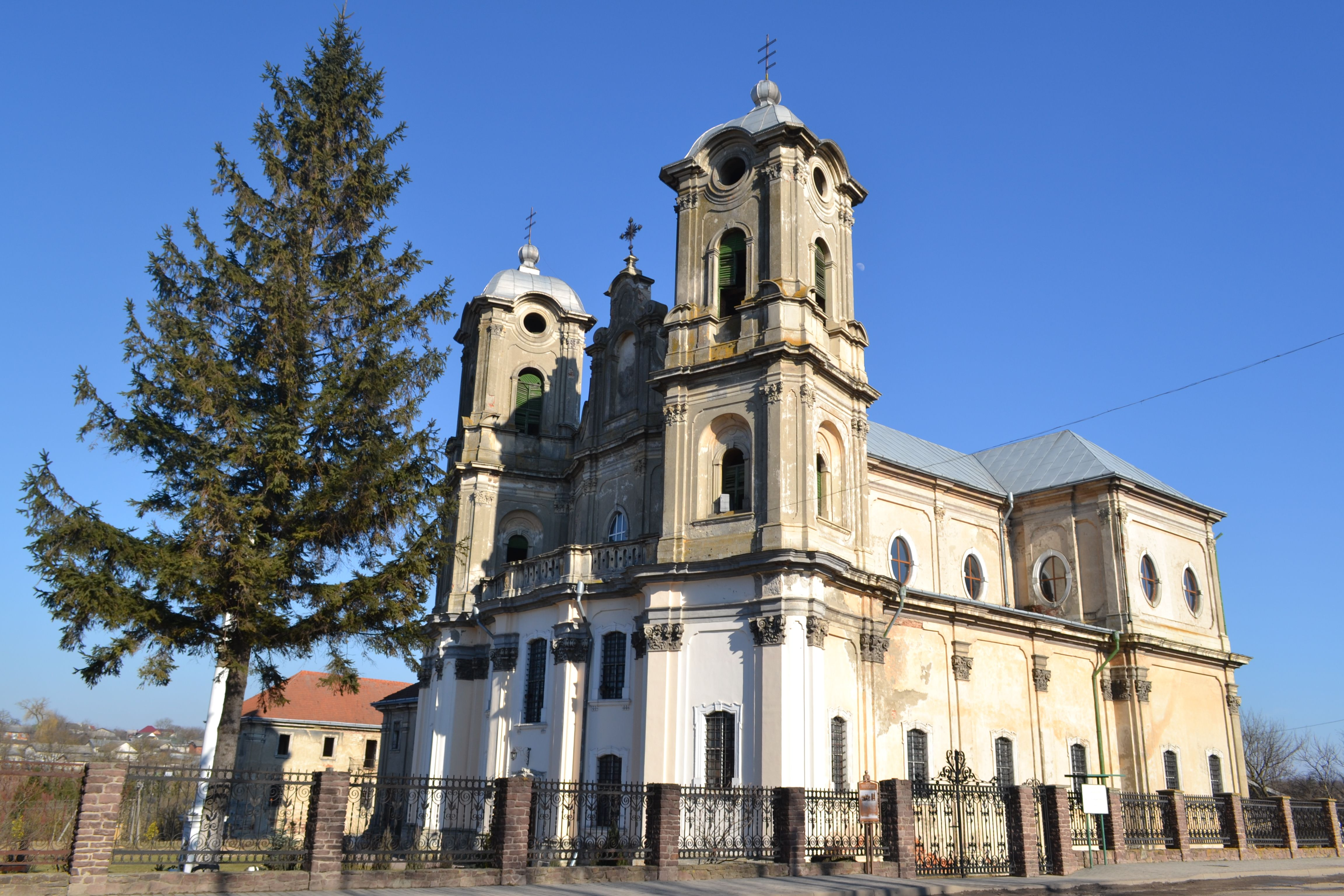 Костел Непорочного Зачаття Діви Марії (мур.), Городенка